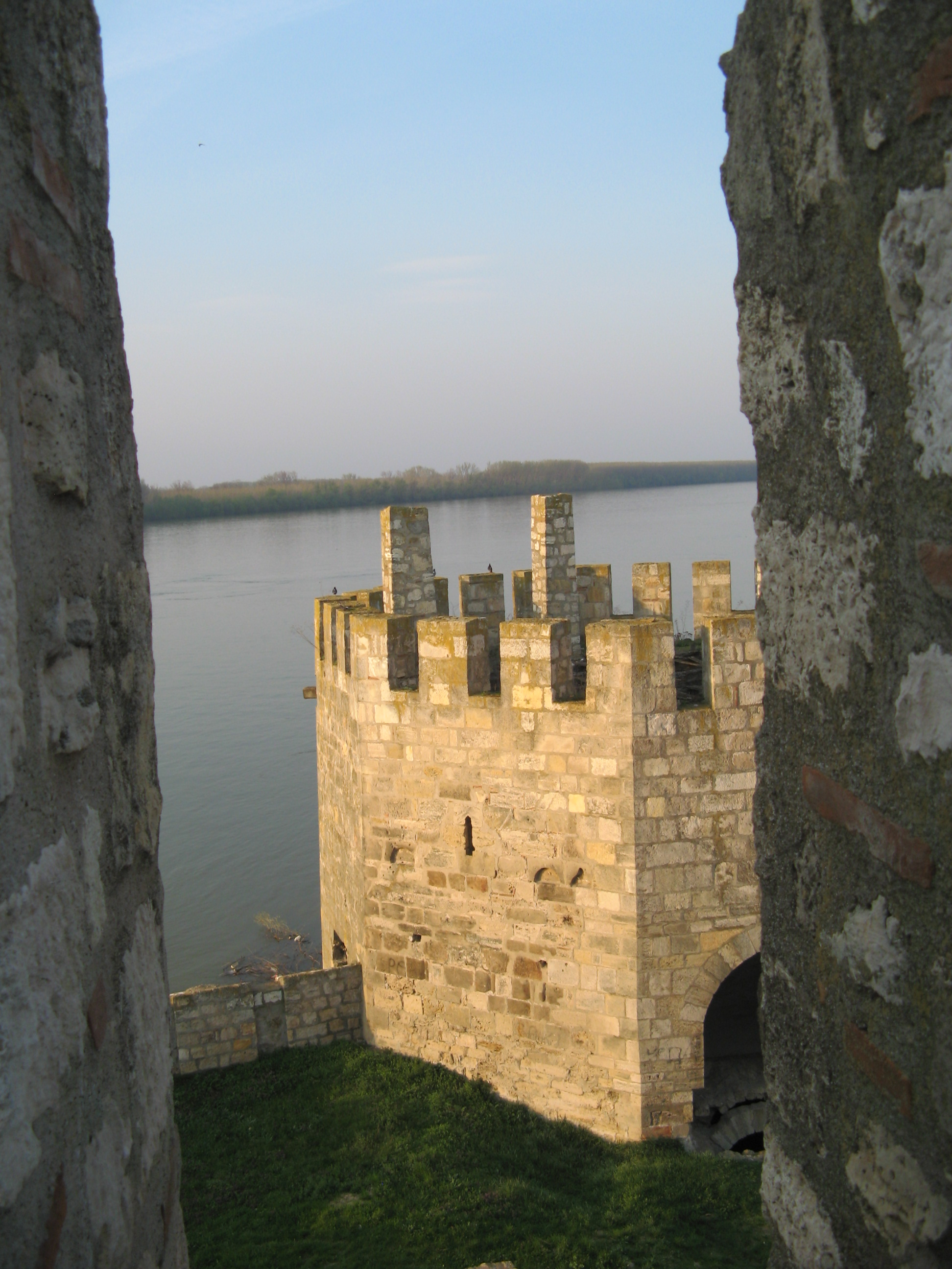 Смедеревска тврђава